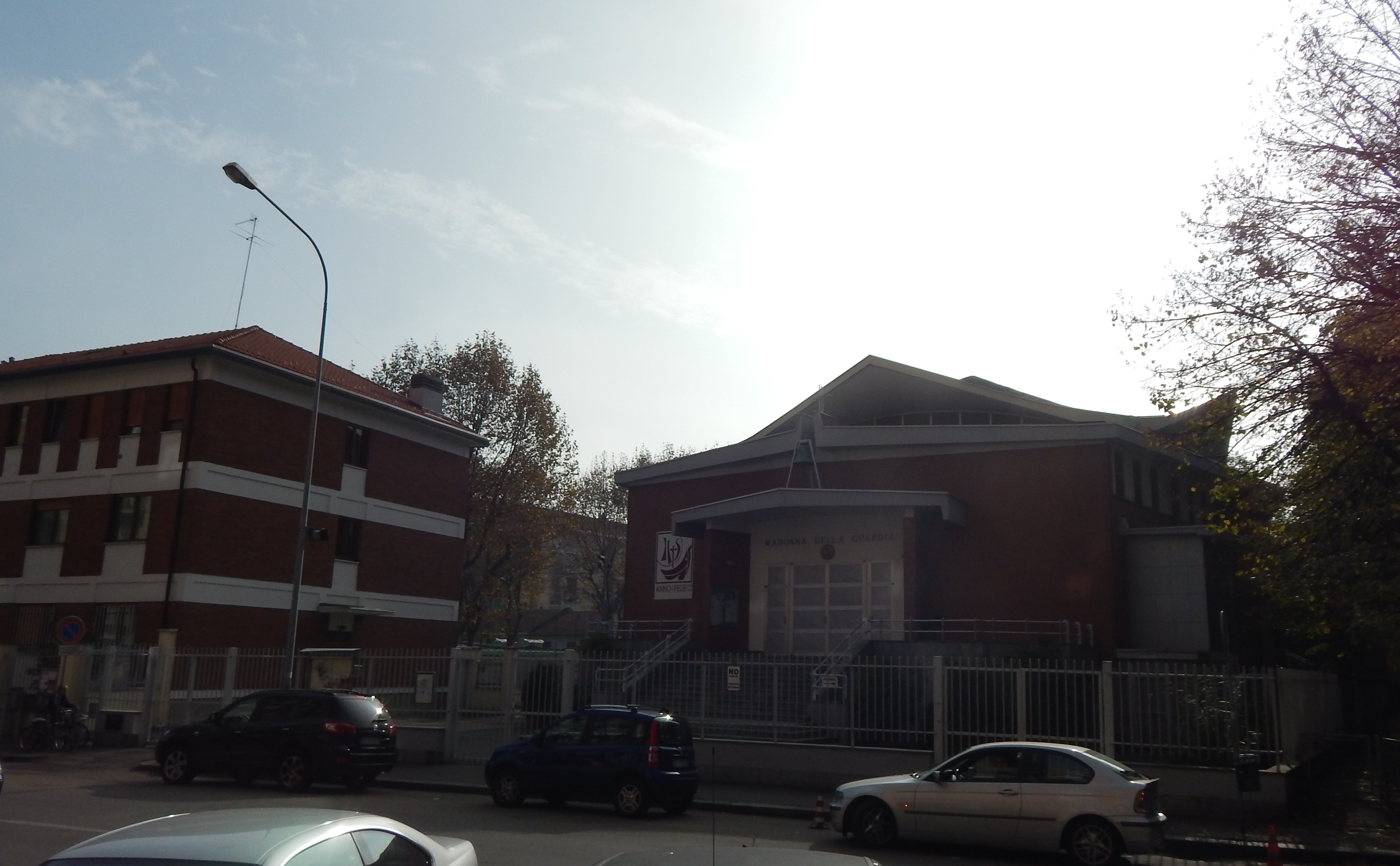 Una veduta di Borgata Lesna